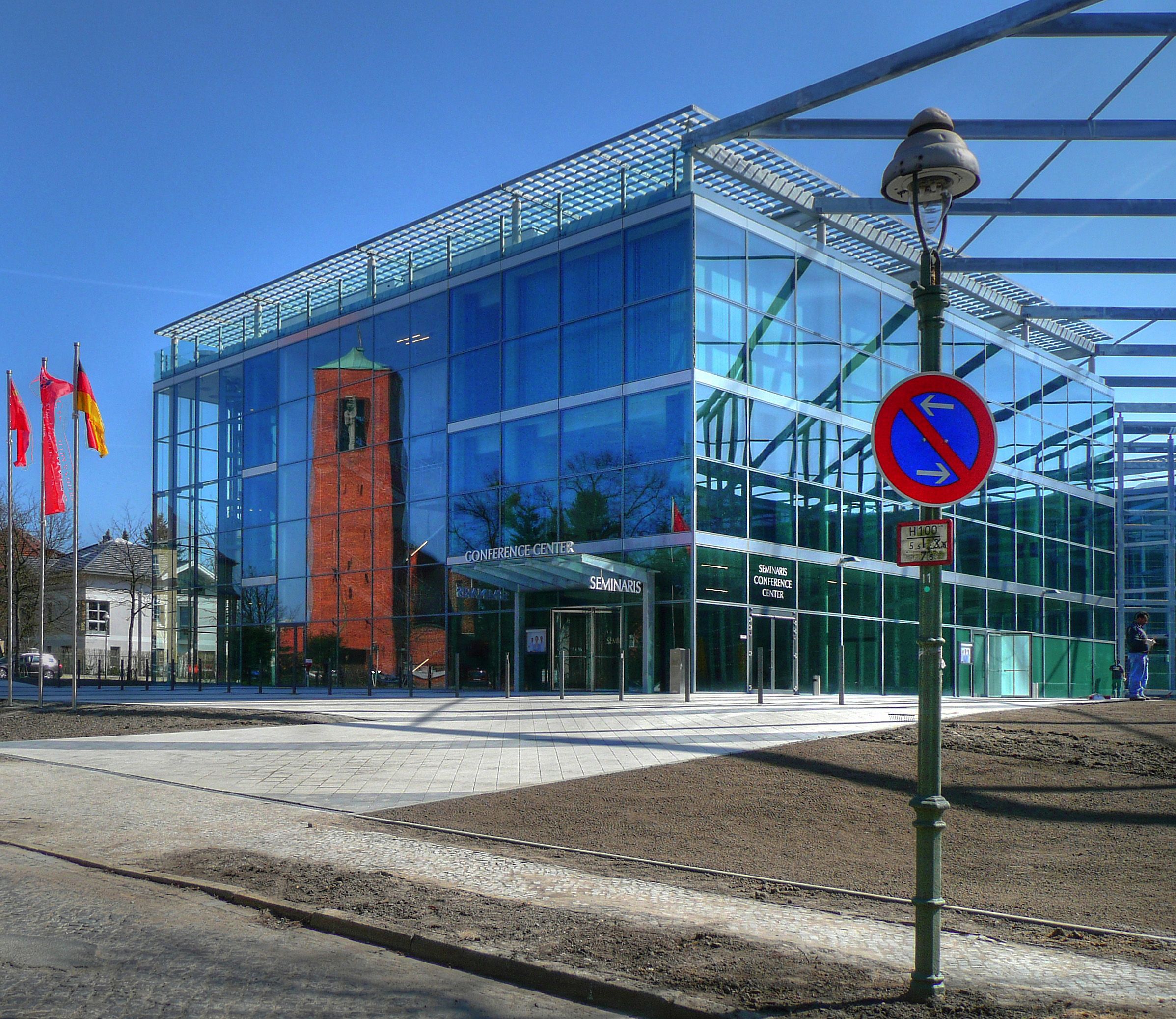 Seminaris Conference Center in Berlin-Dahlem, in der Fensterfront spiegelt sich die katholische Pfarrkirche St. Bernhard